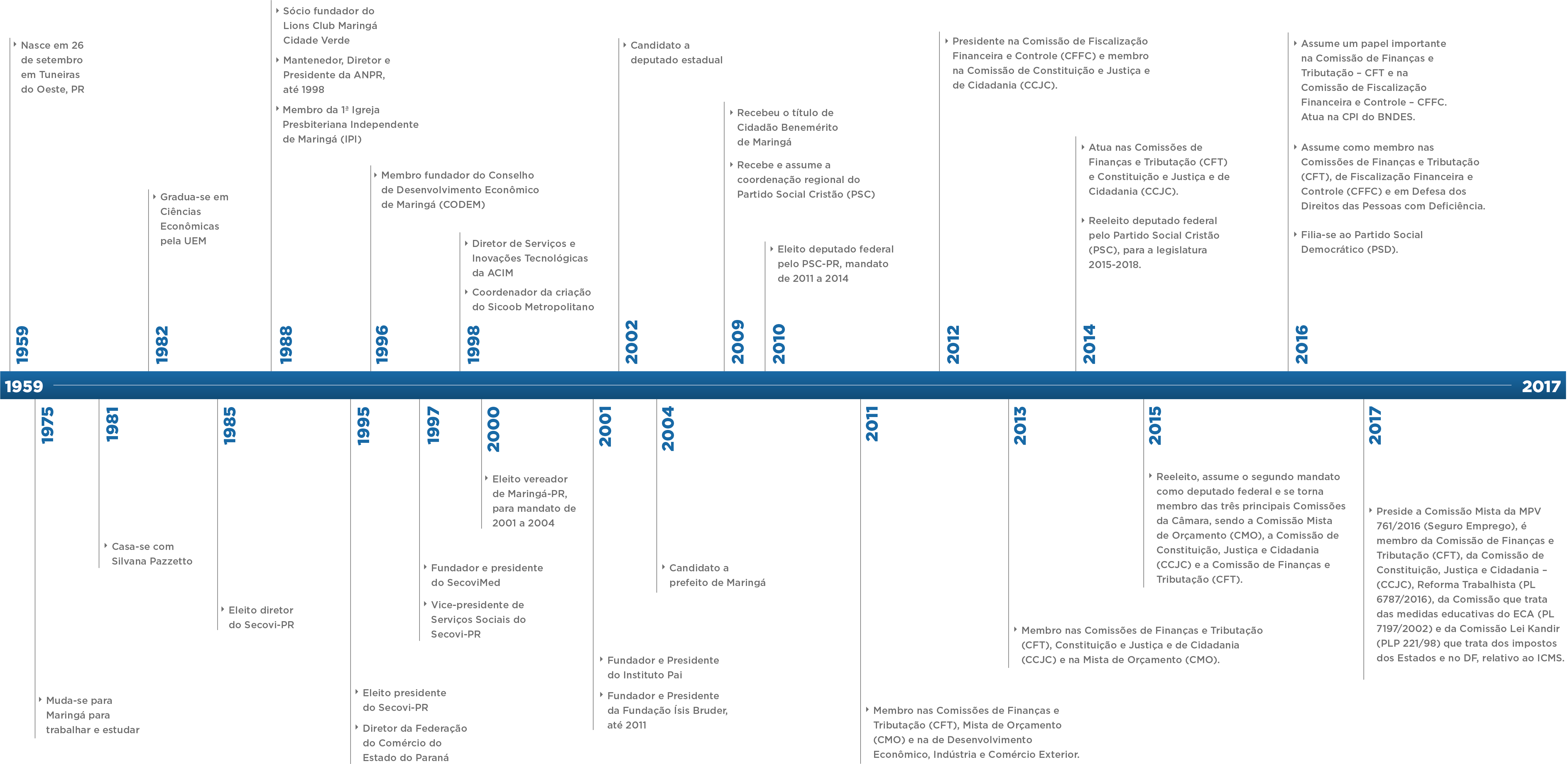 Descrição cronológica da vida pessoal, setorial e política do deputado federal Edmar Arruda.